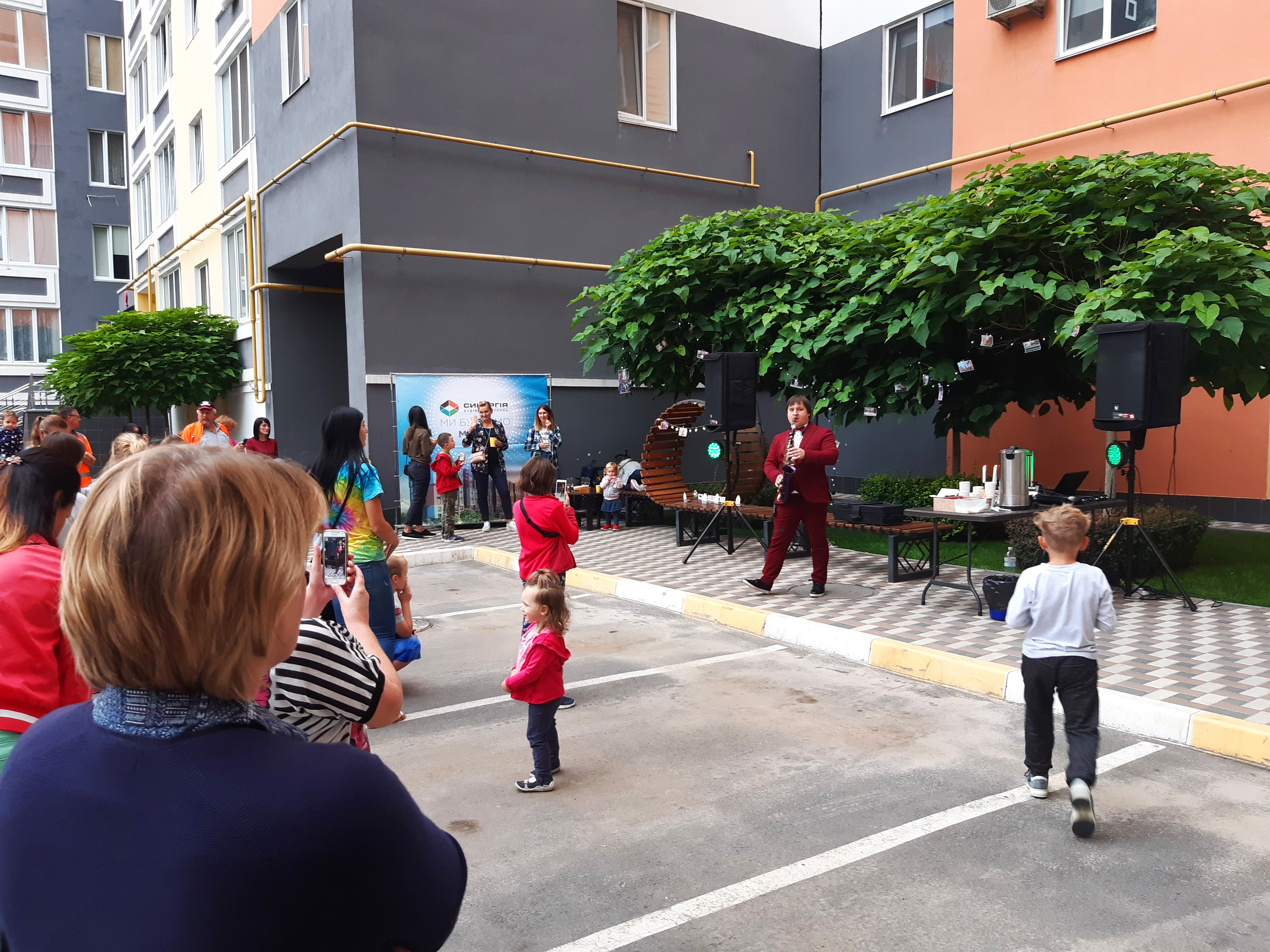 Концерт в подвір'ї ЖК «Синергія-2». Урочище Пилипів Потік. Ірпінь